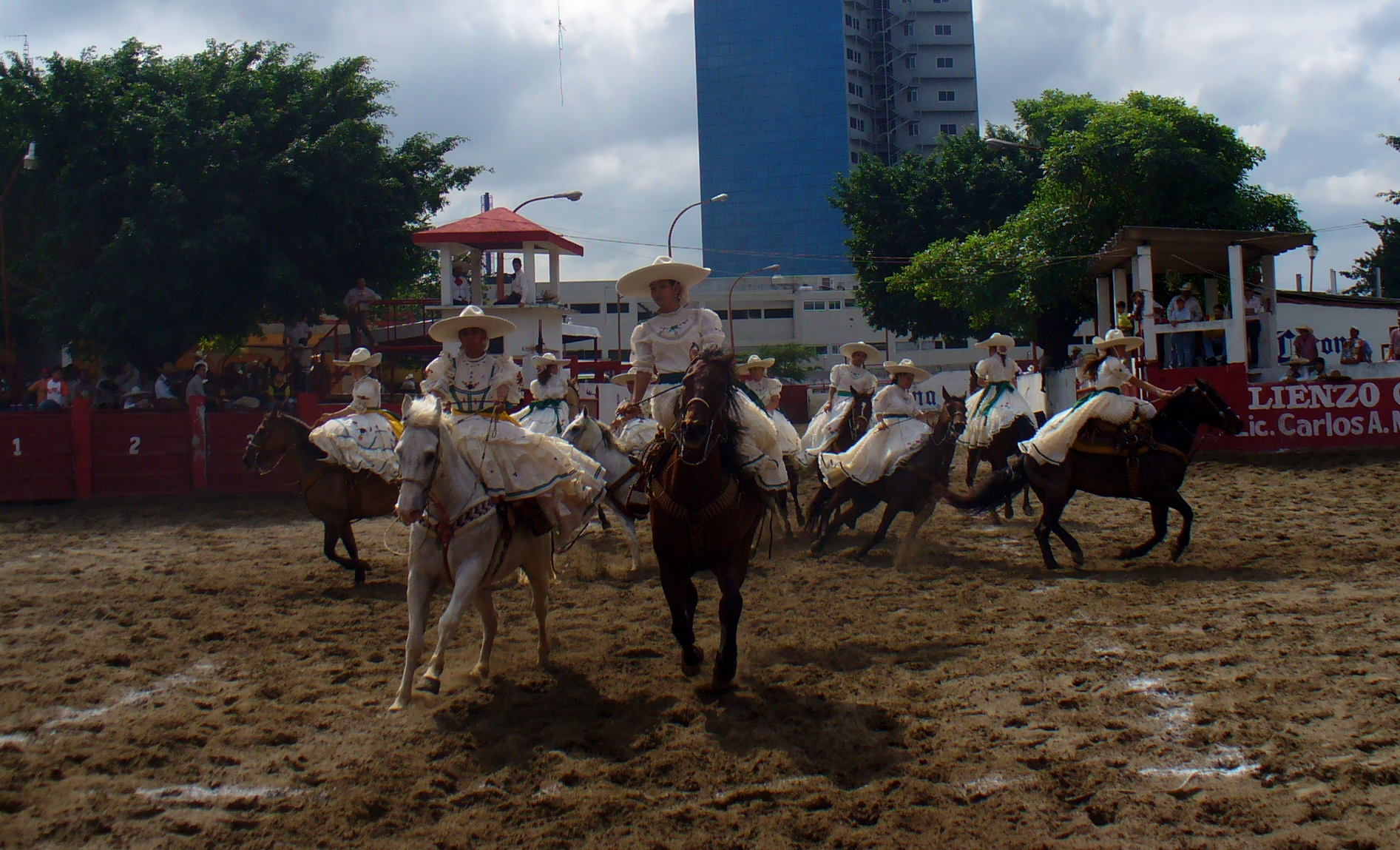 Escaramuzas Charras saliendo del centro del Ruedo